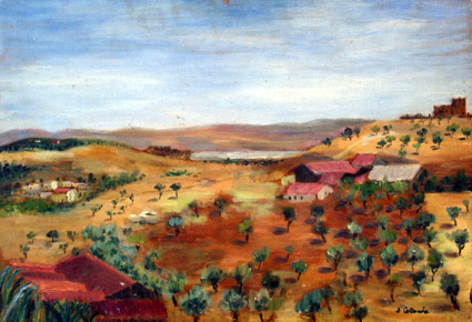 Peinture de l'Ariana par Catania au début du XXème siècle Collection privée (Raspail)